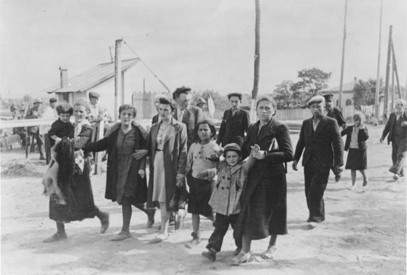 Kischinjow, festgenommene Juden Scherl: An der Sowjetfront: Jüdische Heckenschützen und deren Angehörige werden von den Rumänen zu einem Sammelplatz geführt. (Kischinjow) PK-Aufnahme: Kriegsberichter: Brunnengräber Juli 41 7177-41 [Moladawien, Kischinjow.- jüdischen Frauen, Kinder und Männer] Information added by Wikimedia users.